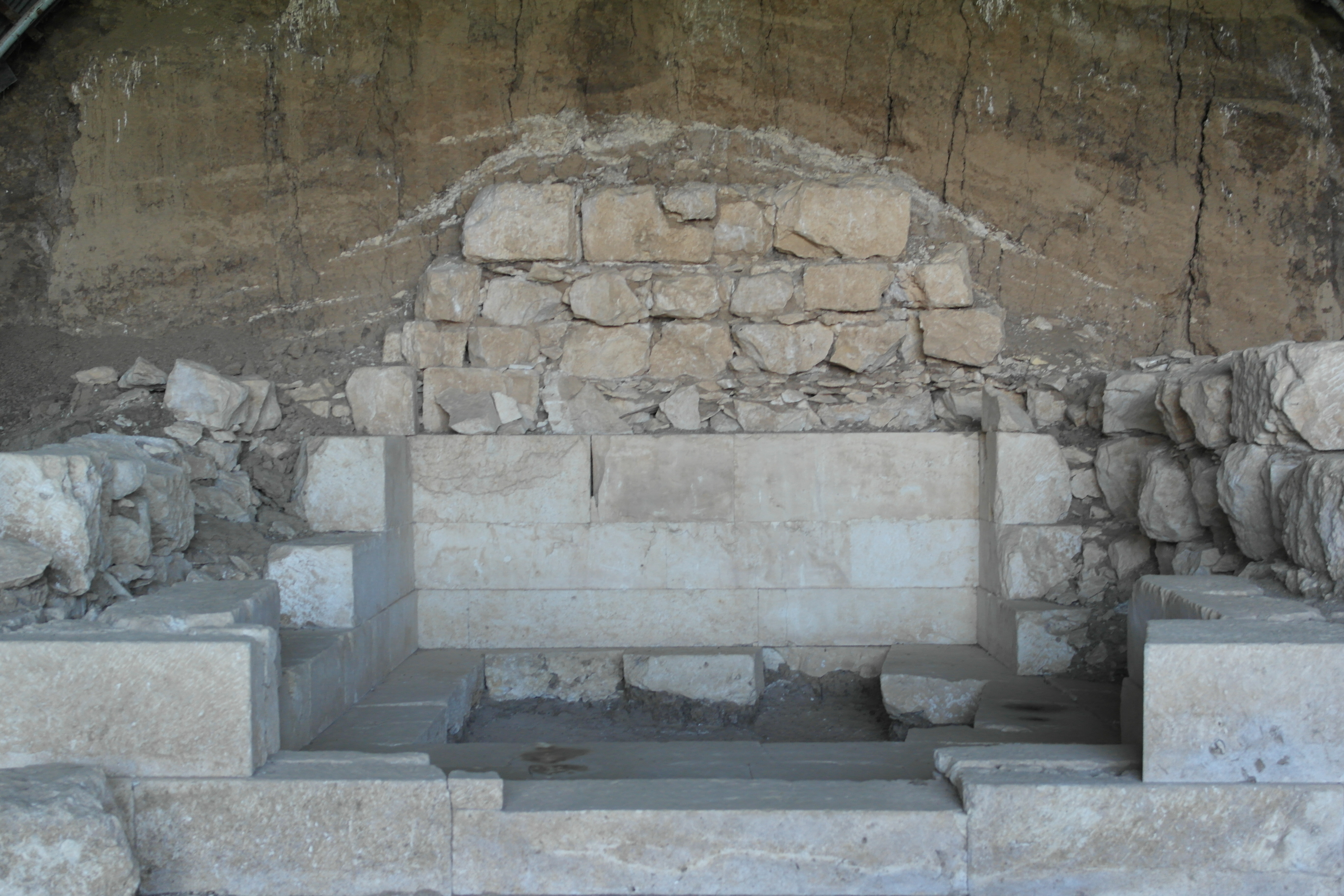 Trakisches Grab in Sveshtari, Nr 2 im Rundgang